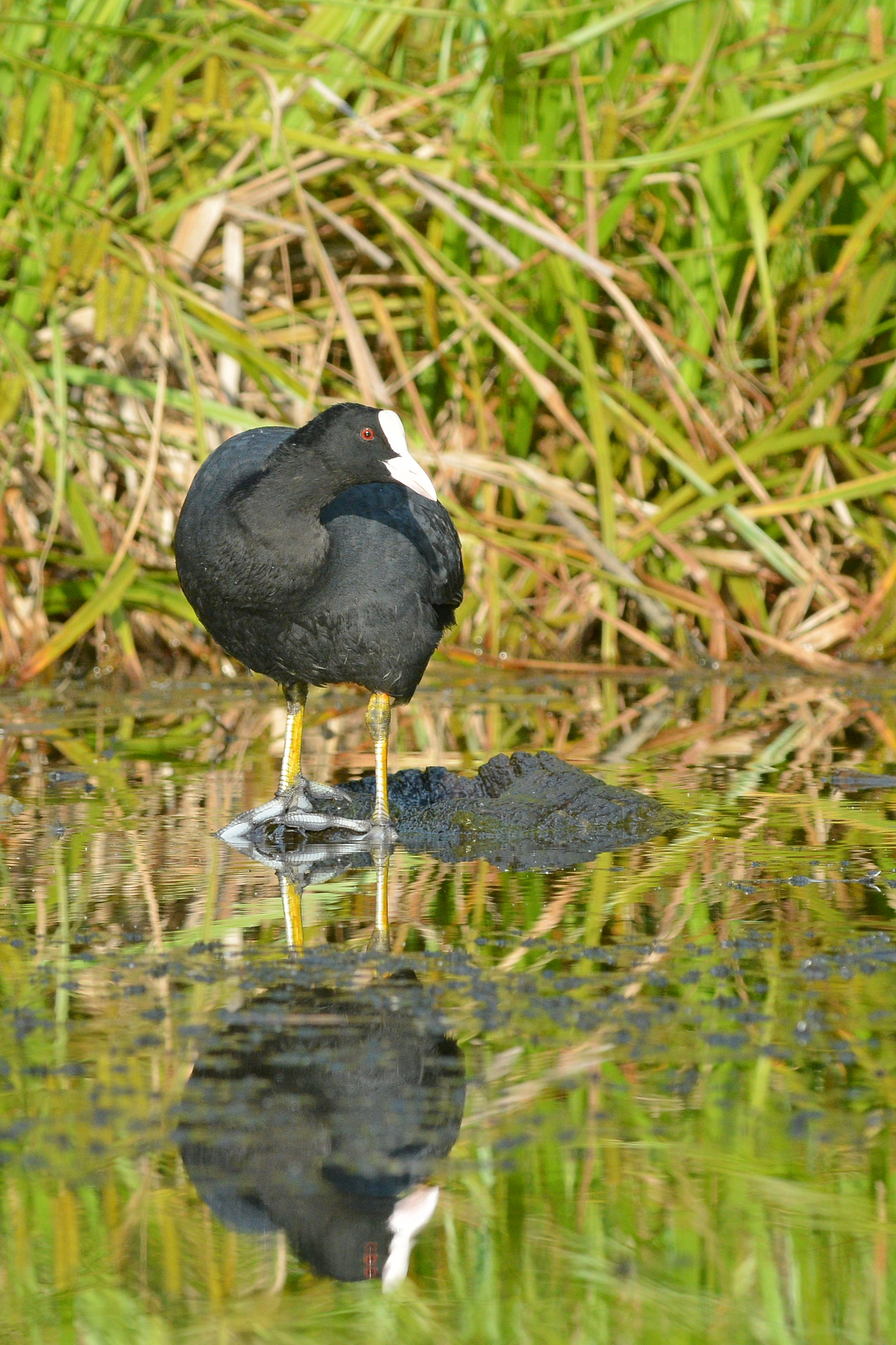 Типовий представник навколоводної орнітофауни України